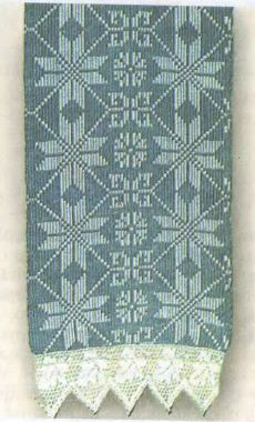 Слуцкае ткацтва. Ручнік. Вёска Барок Слуцкага раёна